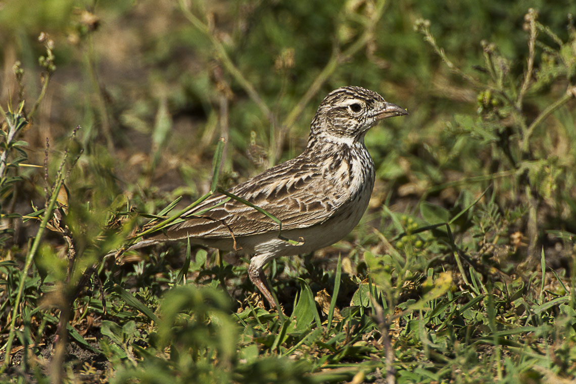 Singing Bushlark - Tanzania_0143